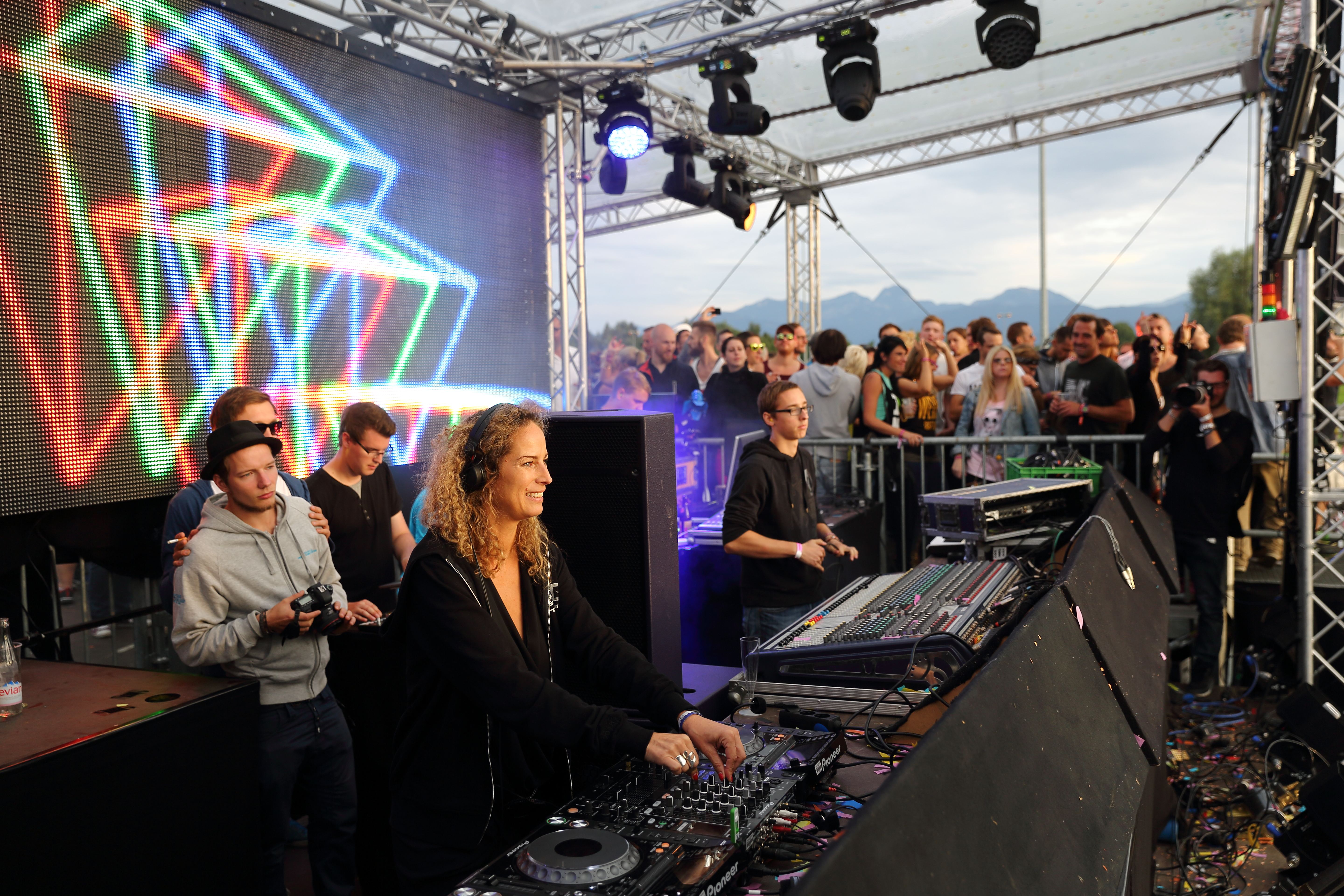 Monika Kruse auf dem Echelon 2014 Festivalsommer This photo was created with the support of donations to Wikimedia Österreich and Wikimedia Deutschland in the context of the CPB project "Festival Summer". For taking this photo and licensing it under a free licence a (press) accreditation was required. The photographer had a valid accreditation and has sent it to the email response team, it has been archived in the OTRS system. Users with OTRS account can access it here. Please be aware that (press) accreditations are a permission to generally take photos only and do not make any statement about the copyright status of this photo! Link to the ticket: Personality rights warningAlthough this work is freely licensed or in the public domain, the person(s) shown may have rights that legally restrict certain re-uses unless those depicted consent to such uses. In these cases, a model release or other evidence of consent could protect you from infringement claims.